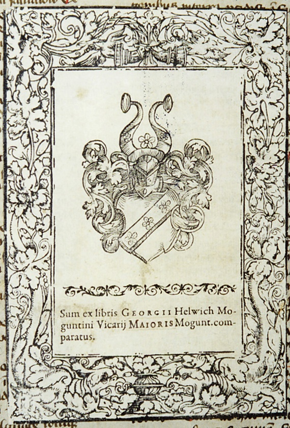 Georg Helwich, Domvikar und Historiker, Mainz (1588-1632), Exlibris aus einem seiner Bücher